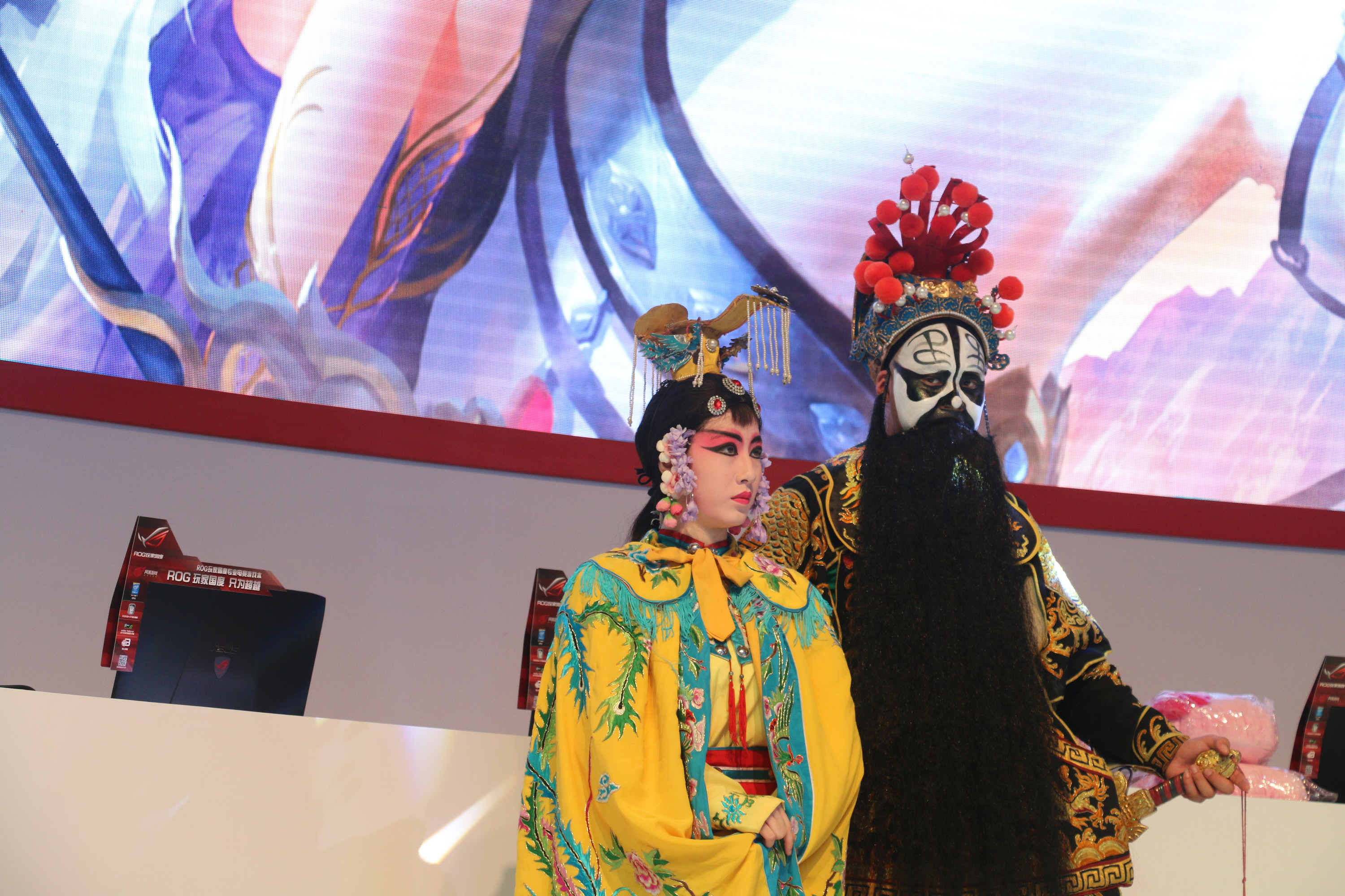 2015ChinaJoy Cosplay 第二集